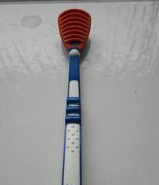 ein Zungenschaber